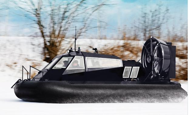 Катер на воздушной подушке Мираж-7